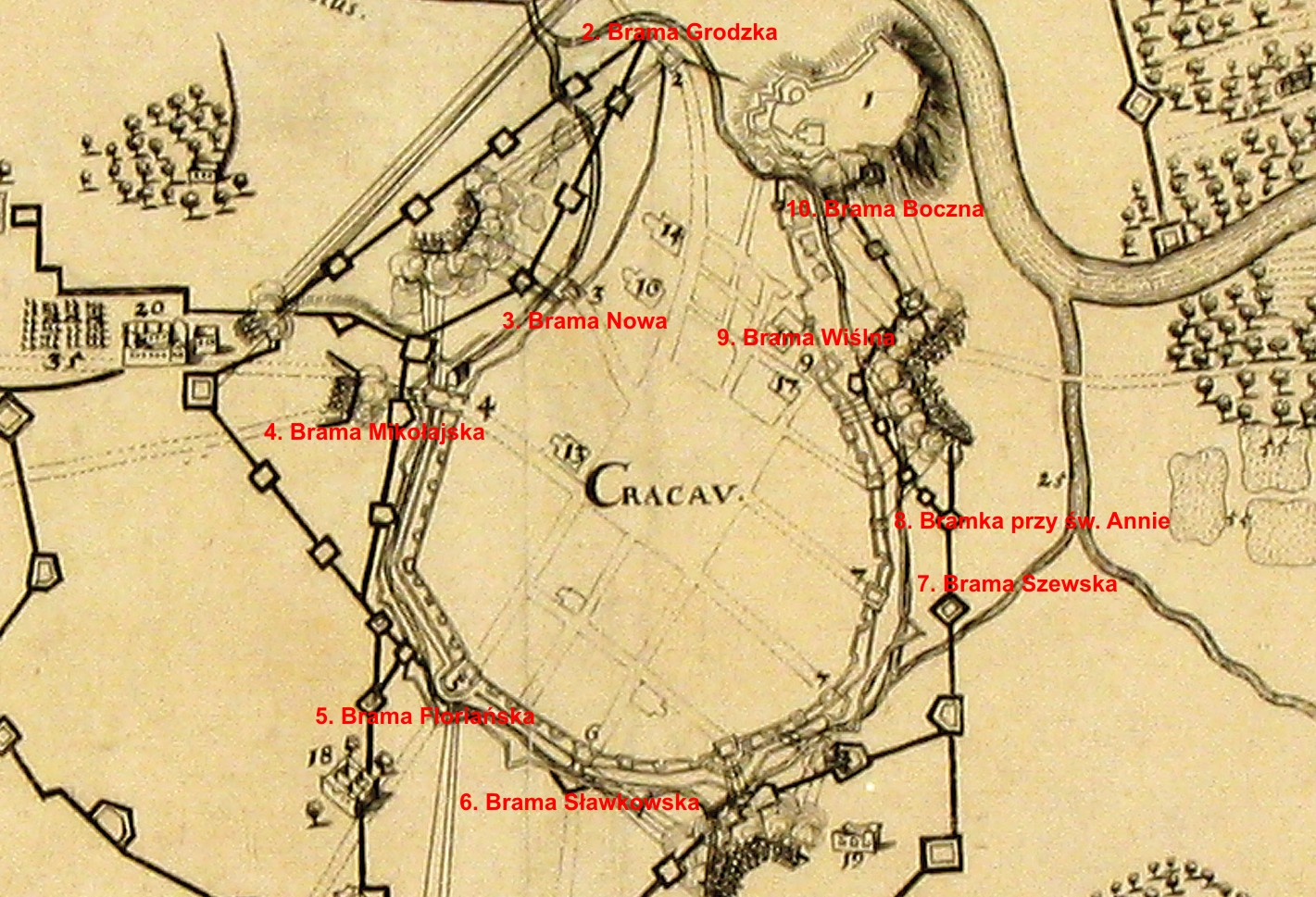 Bramy miejskie na planie Krakowa z 1657 (fragment oryginalnego planu szwedzkiego oblężenia Krakowa z własnymi modyfikacjami)